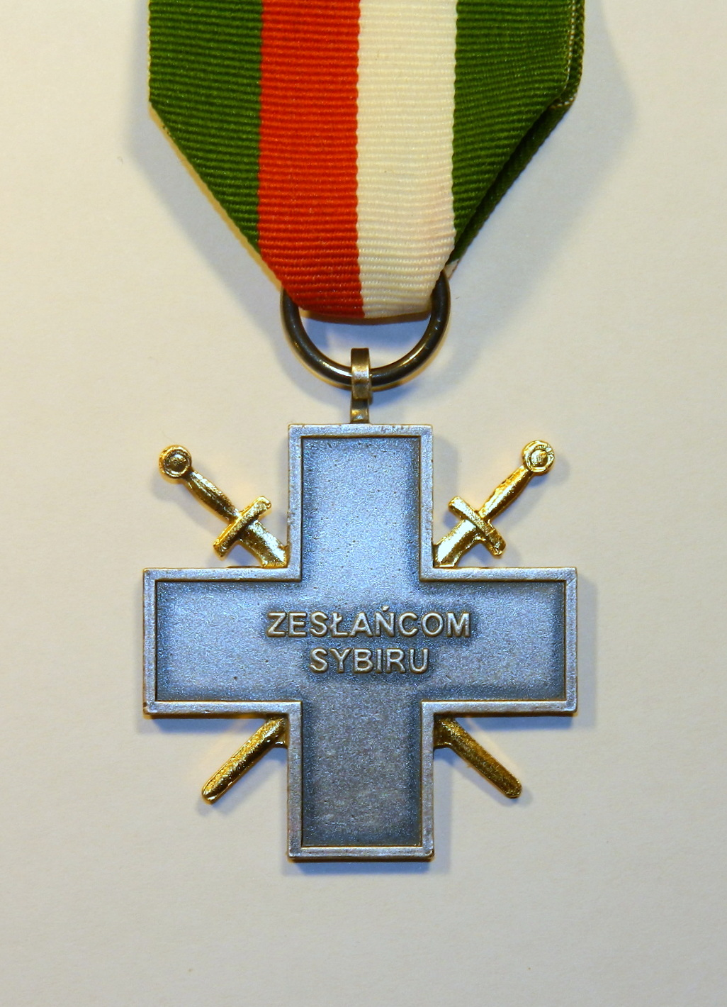 Krzyż Zesłańców Sybiru - rewers